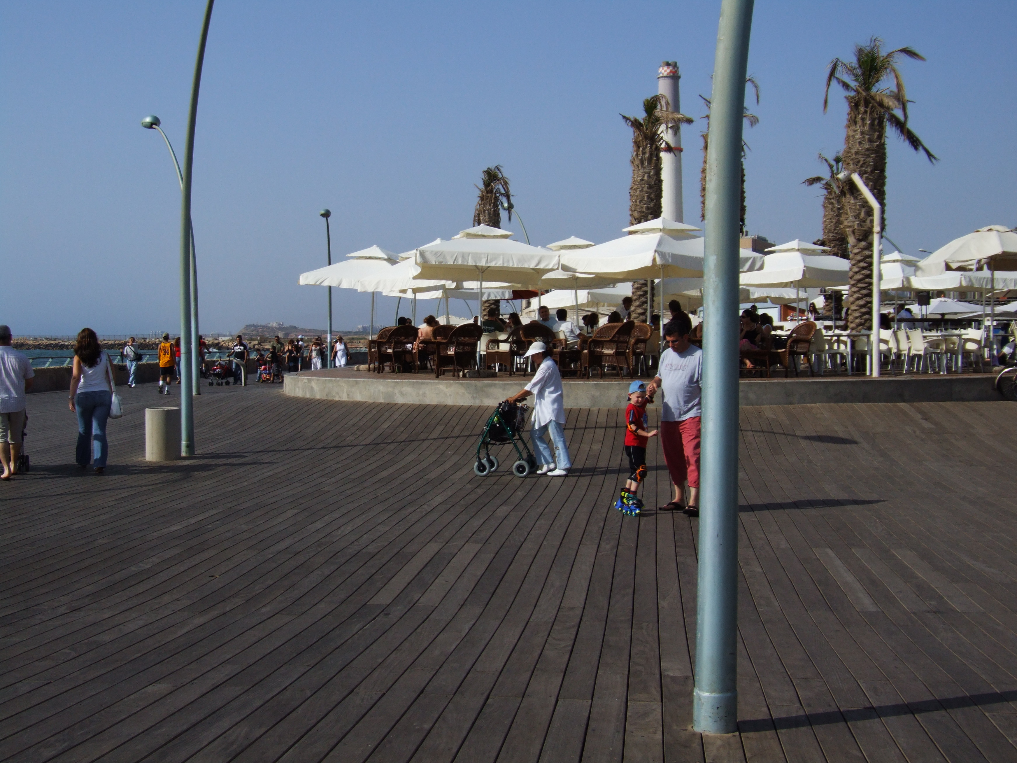 tel aviv harbor.